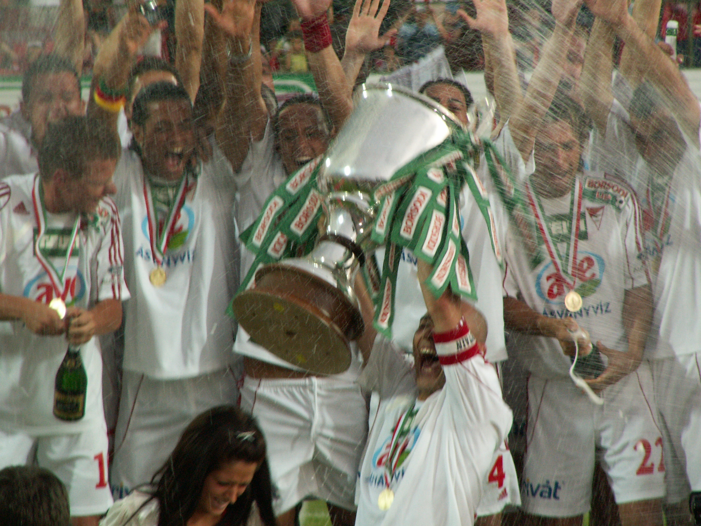 A DVSC csapatkapitánya, Sándor Tamás 2007. május 26-án átveszi a bajnoki serleget, saját kép